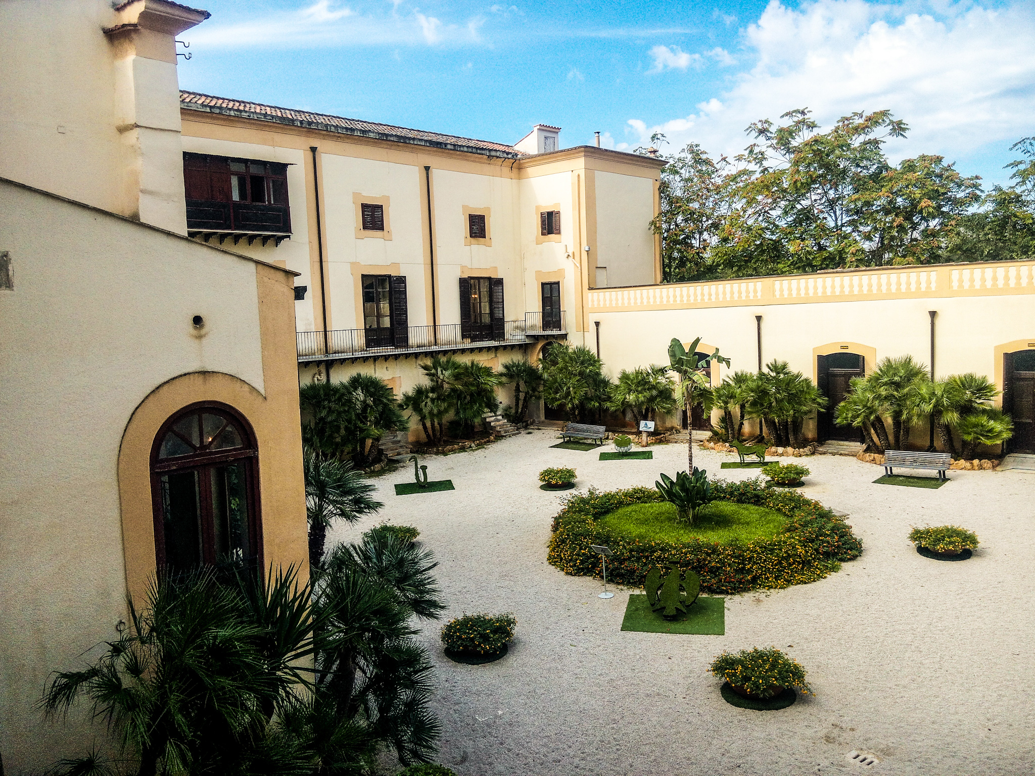 Villa Niscemi This is a photo of a monument which is part of cultural heritage of Italy.